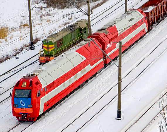 Газотурбовоз ГТ1-001 с грузовым поездом и тепловоз ЧМЭ3 на кольце ВНИИЖТ в Щербинке, вид сверху